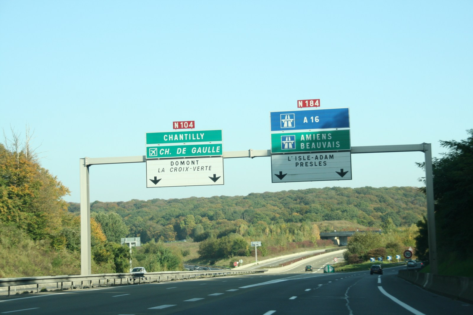 Route Nationale 184/104 Tronçon Commun